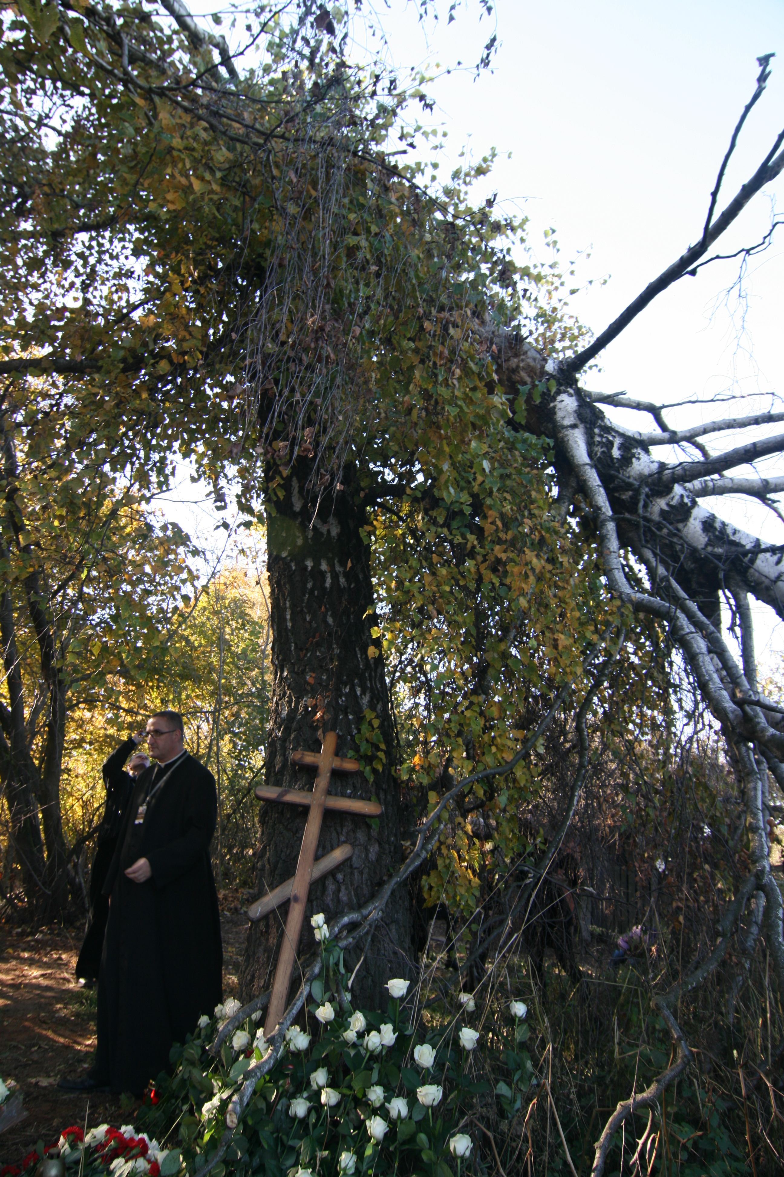 Беларуская (тарашкевіца): Урачыстасьці пад смаленскай бярозай. 10 кастрычніка 2010 року